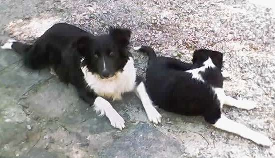 Foto: cães da raça ovelheiro gaúcho, obtida em outubro de 2006 por Praxides